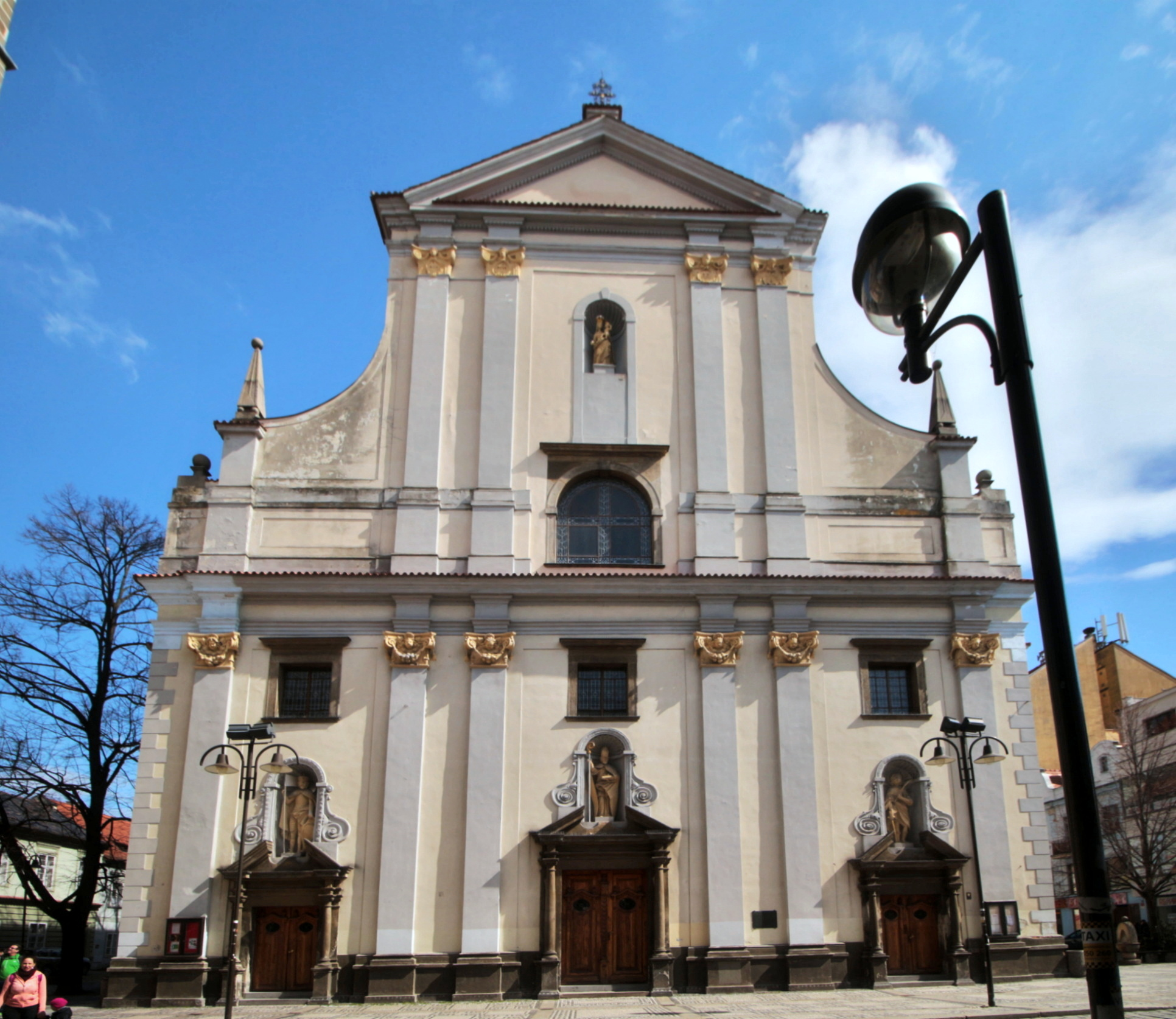 České Budějovice, katedrála sv. Mikuláše